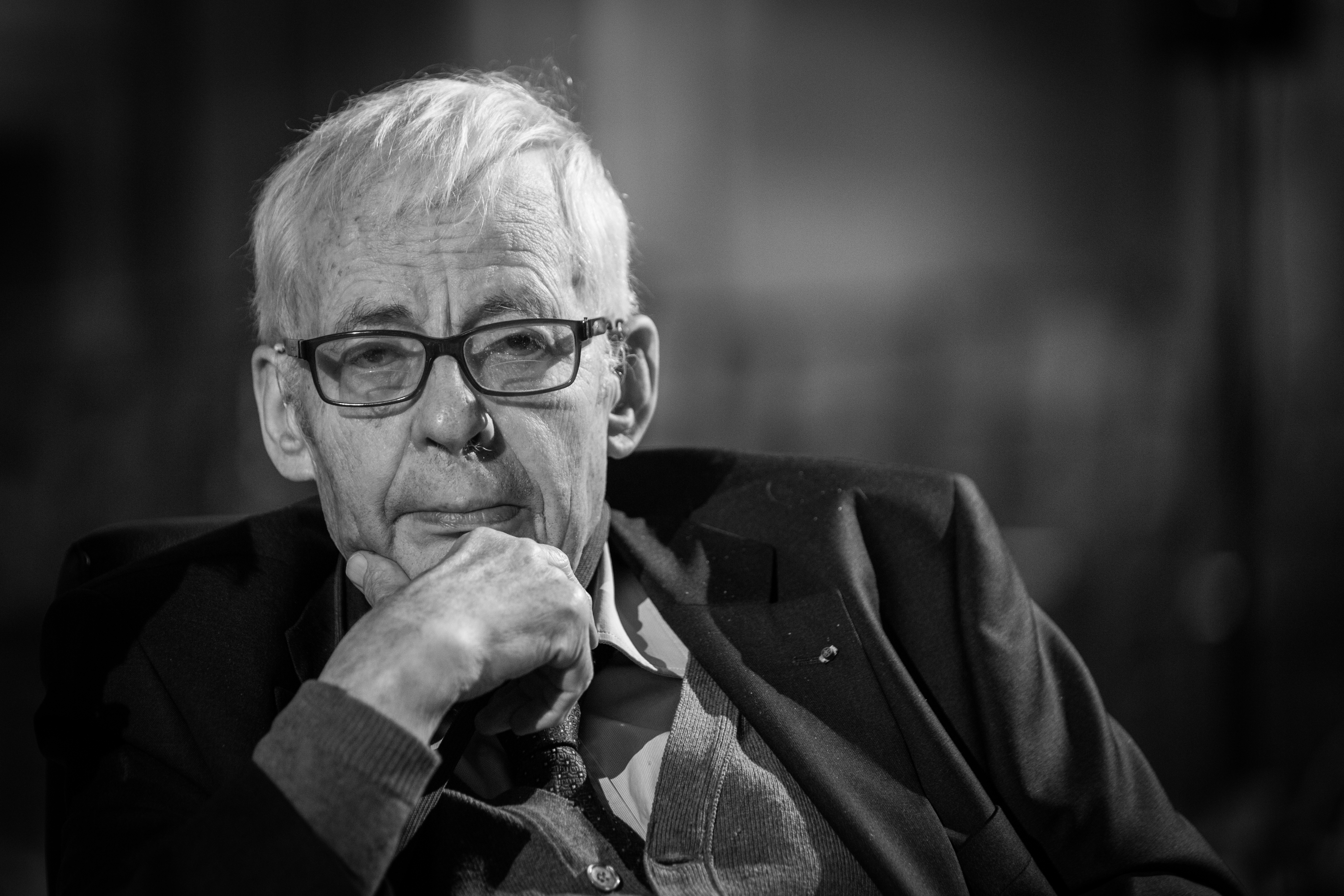 Emmanuel Le Roy Ladurie, né le 19 juillet 1929 aux Moutiers-en-Cinglais (Calvados), est un historien moderniste français.